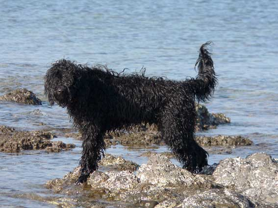 Portekiz Su Köpeği / Fotoğraf: Yalçın Savaş